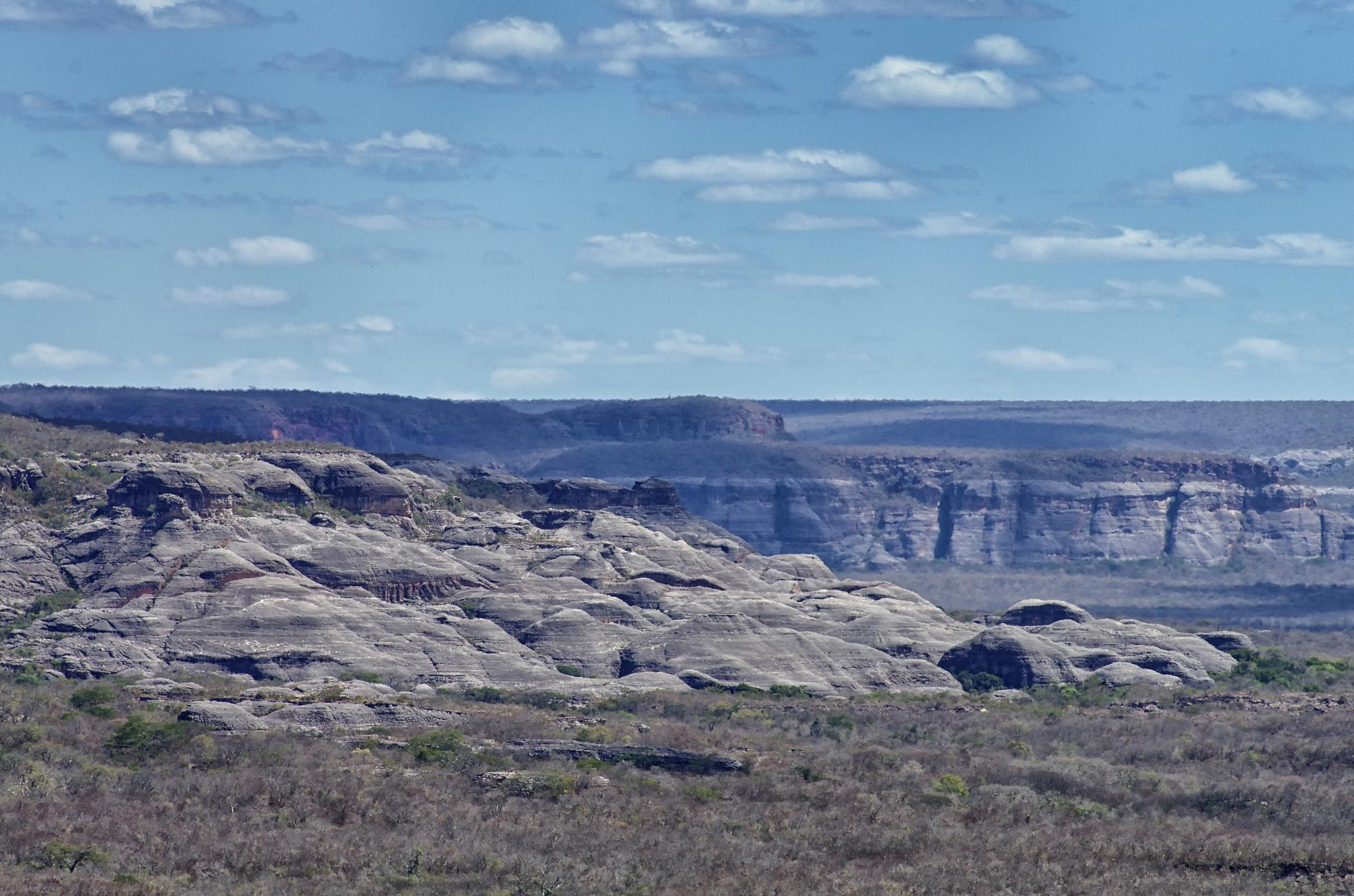 Paisagem com rochedos no interior do parque nacional da Serra das Confusões